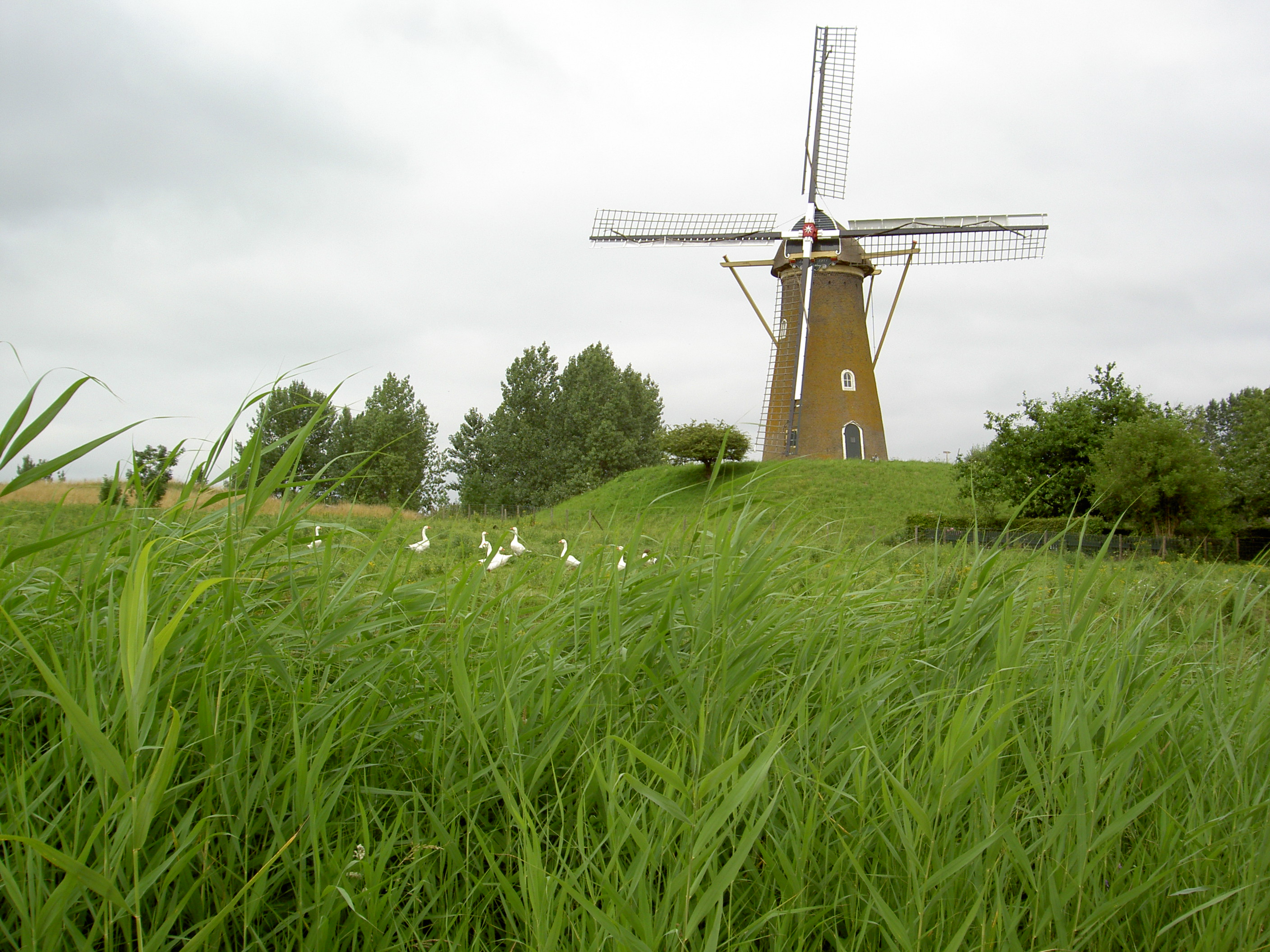 De Eersteling in Hoofddorp (eigen foto)